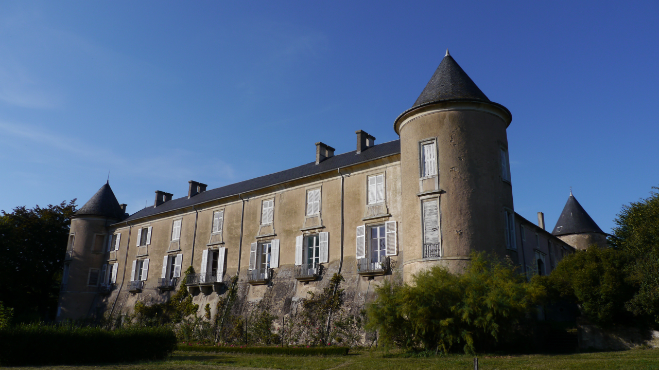 Château de Ville-au-Val, Meurthe-et-Moselle, Lorraine, France